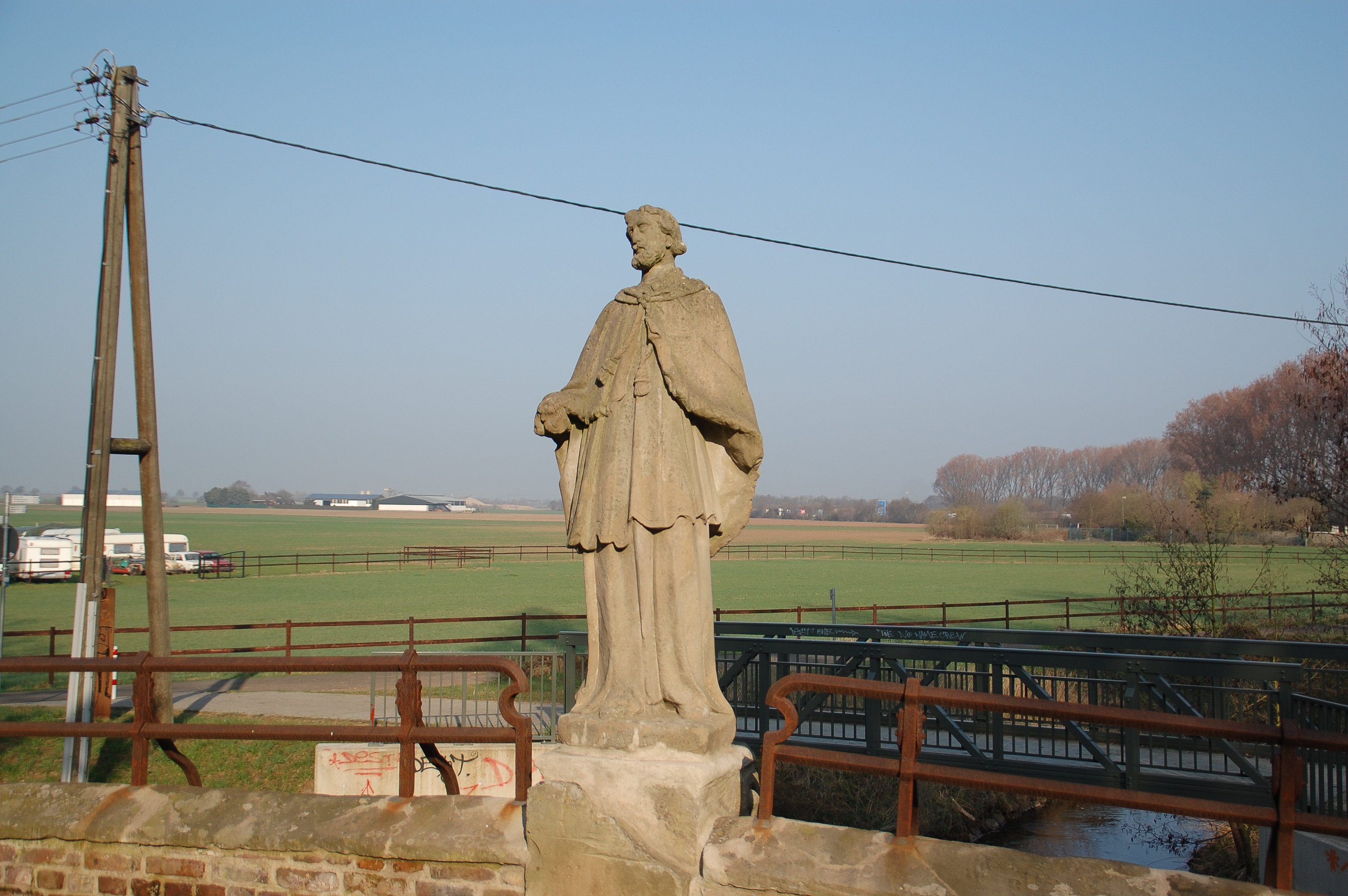 Statue of Johannes von Nepomuk at Johannisbrücke in Gymnich, Erftstadt, Germany